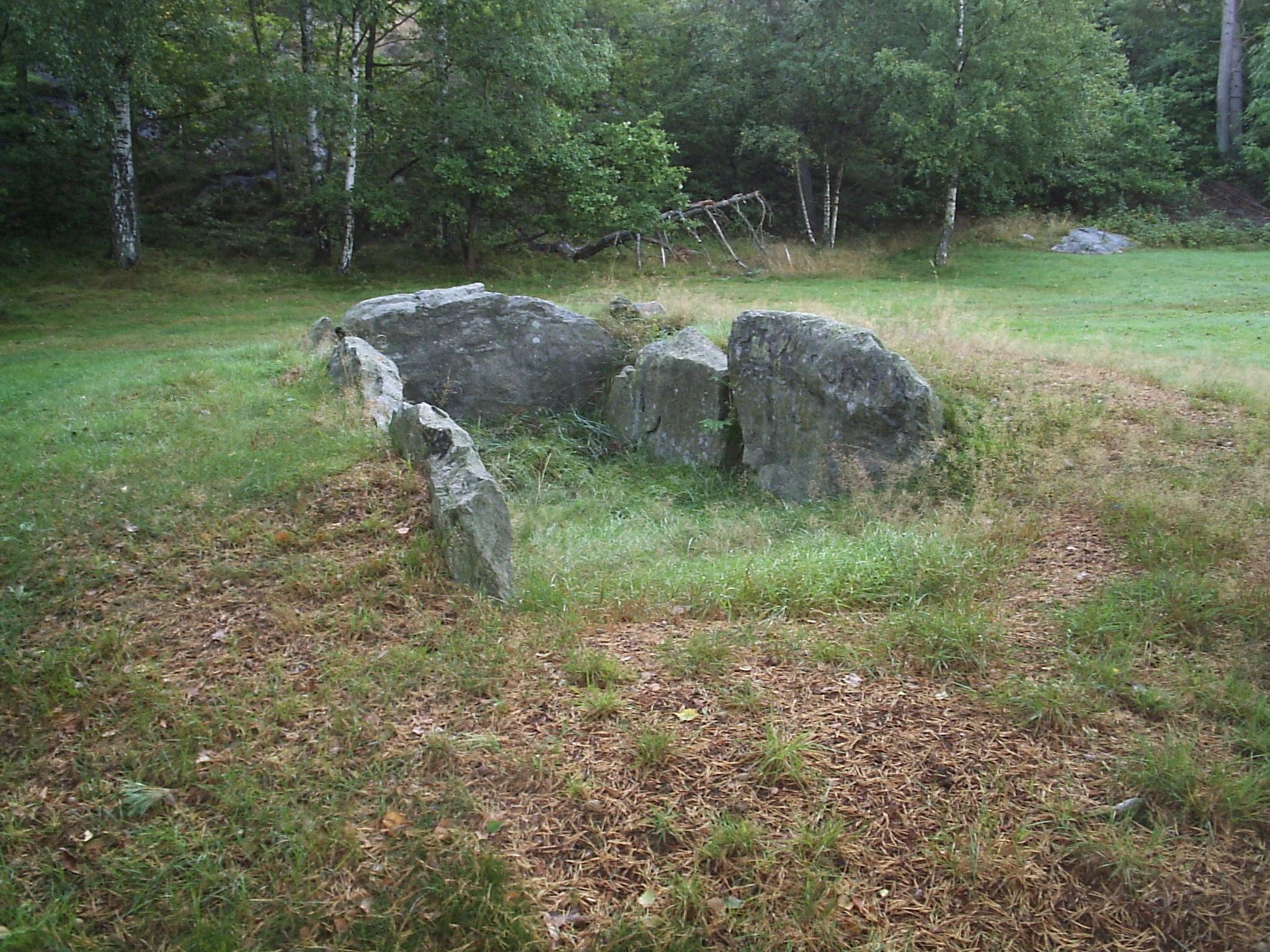 "Kung Rings grav" vid Delsjön i Göteborg är namnet till trots resterna av en hällkista - en familje- eller släktgrav från slutet av stenåldern för cirka 4000 år sedan. Kistan täcktes täcktes tidigare av ett par takhällar, men dessa bortfördes i slutet av 1600-talet, vilket framgår av äldre skrivna källor. Carl von Linné besökte den under sin Västgötaresa. Bilden togs den 4 september 2005 av Harri Blomberg.